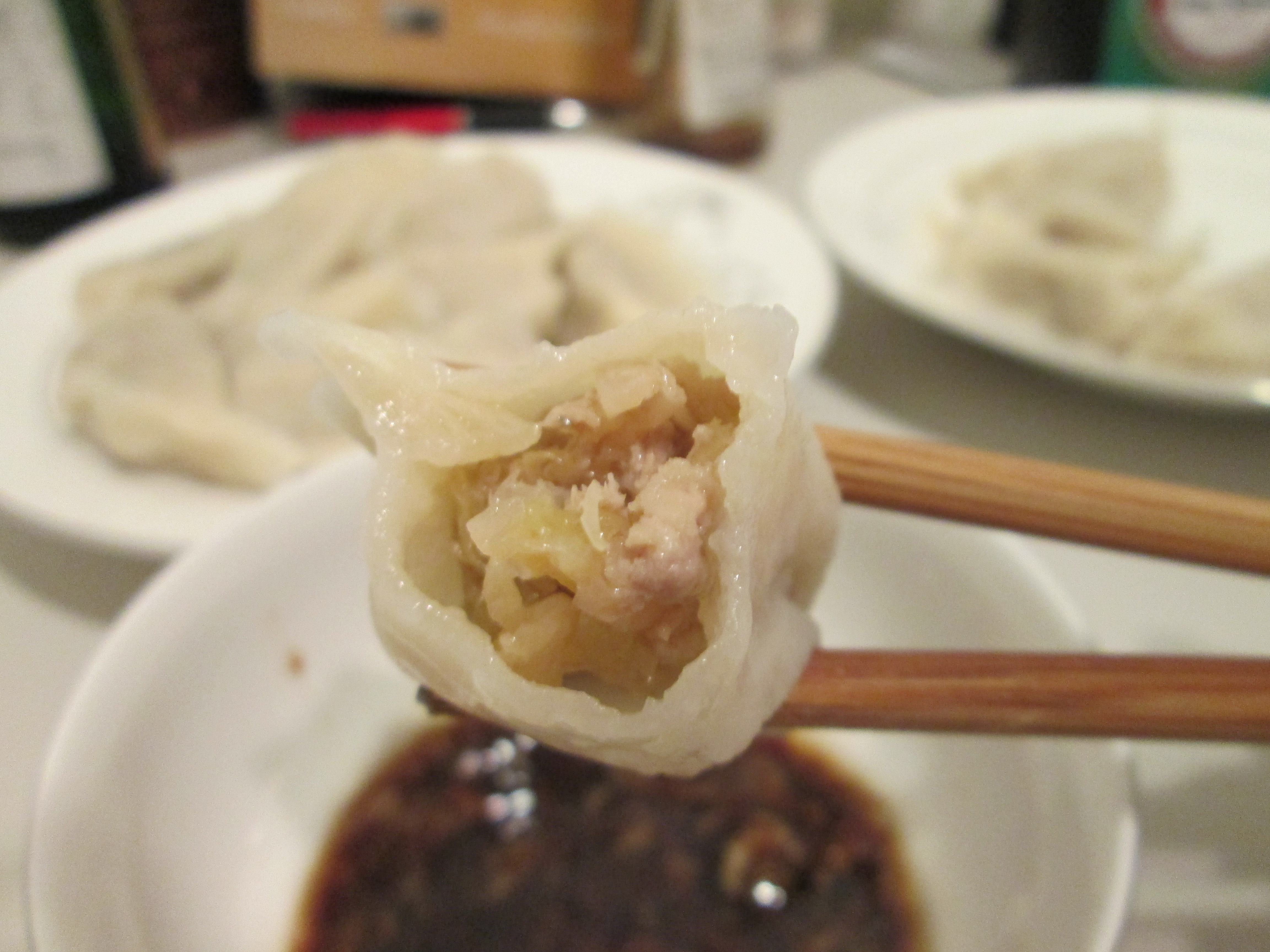 一个咬开的酸菜馅饺子